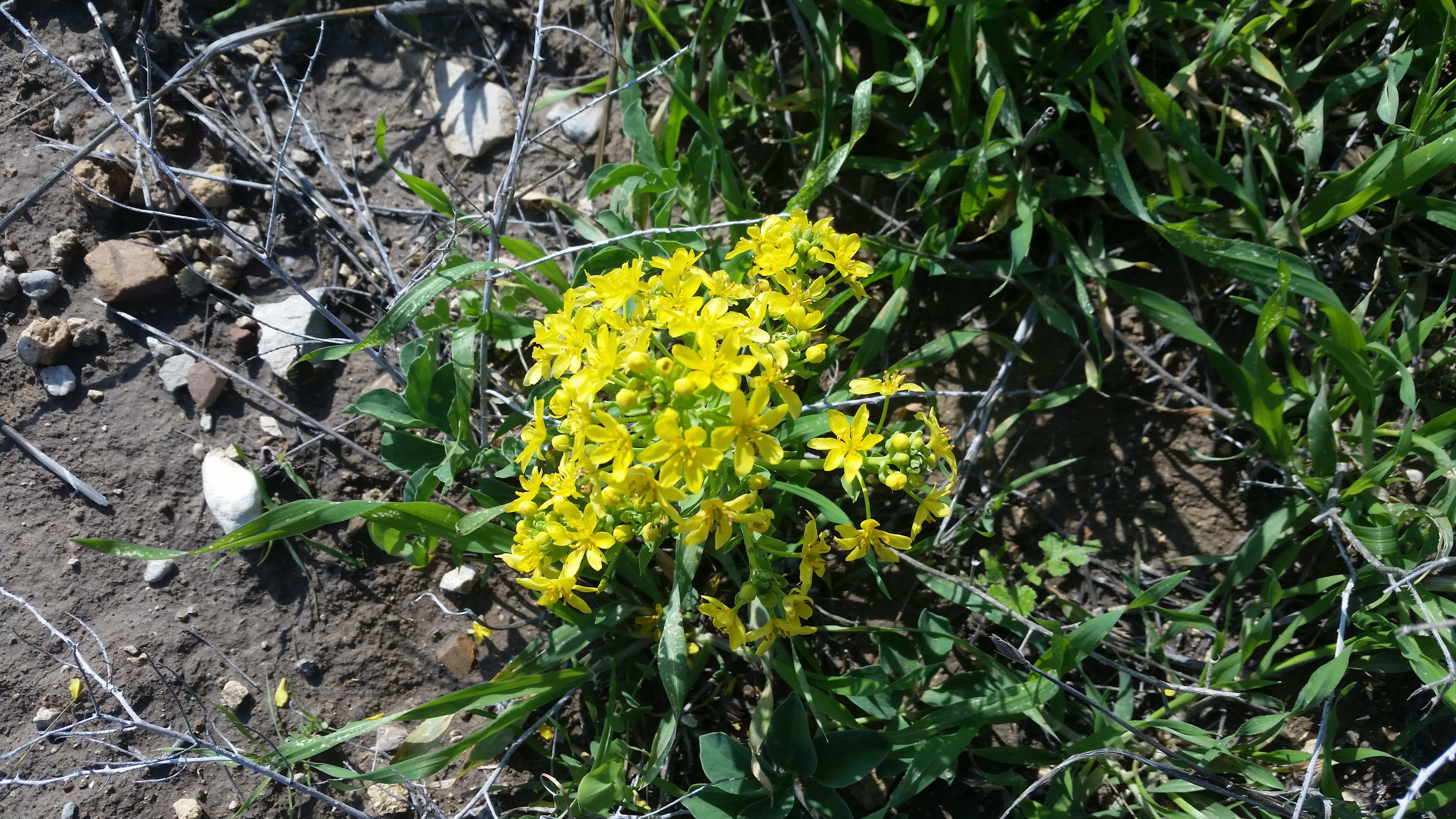 ערטנית השדות בתל לכיש